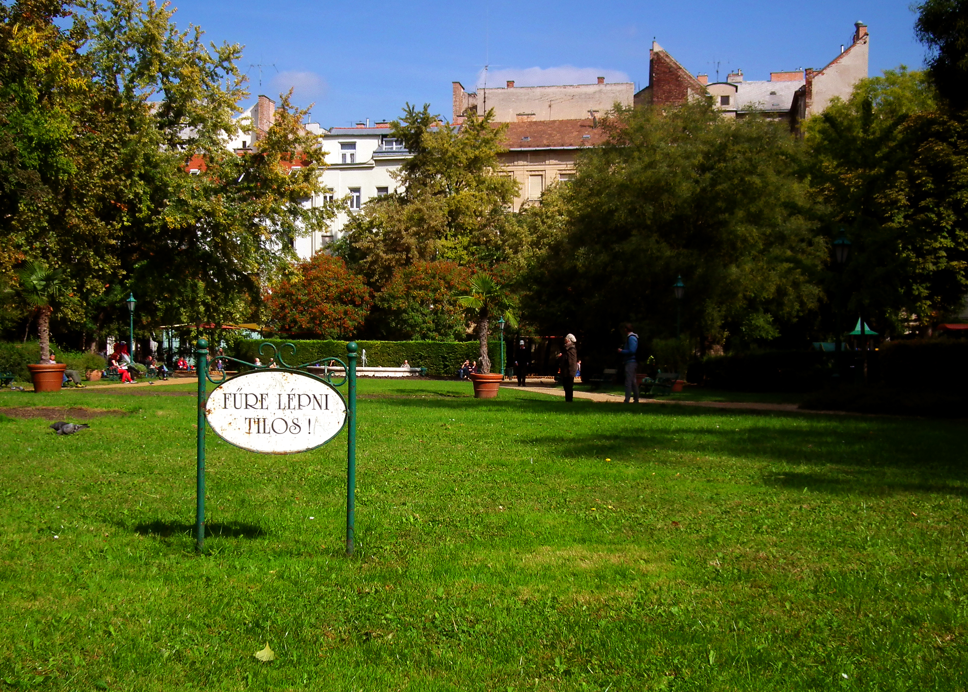 Károlyi-palota és Károlyi-kert This is a photo of a monument in Hungary. Identifier: 501